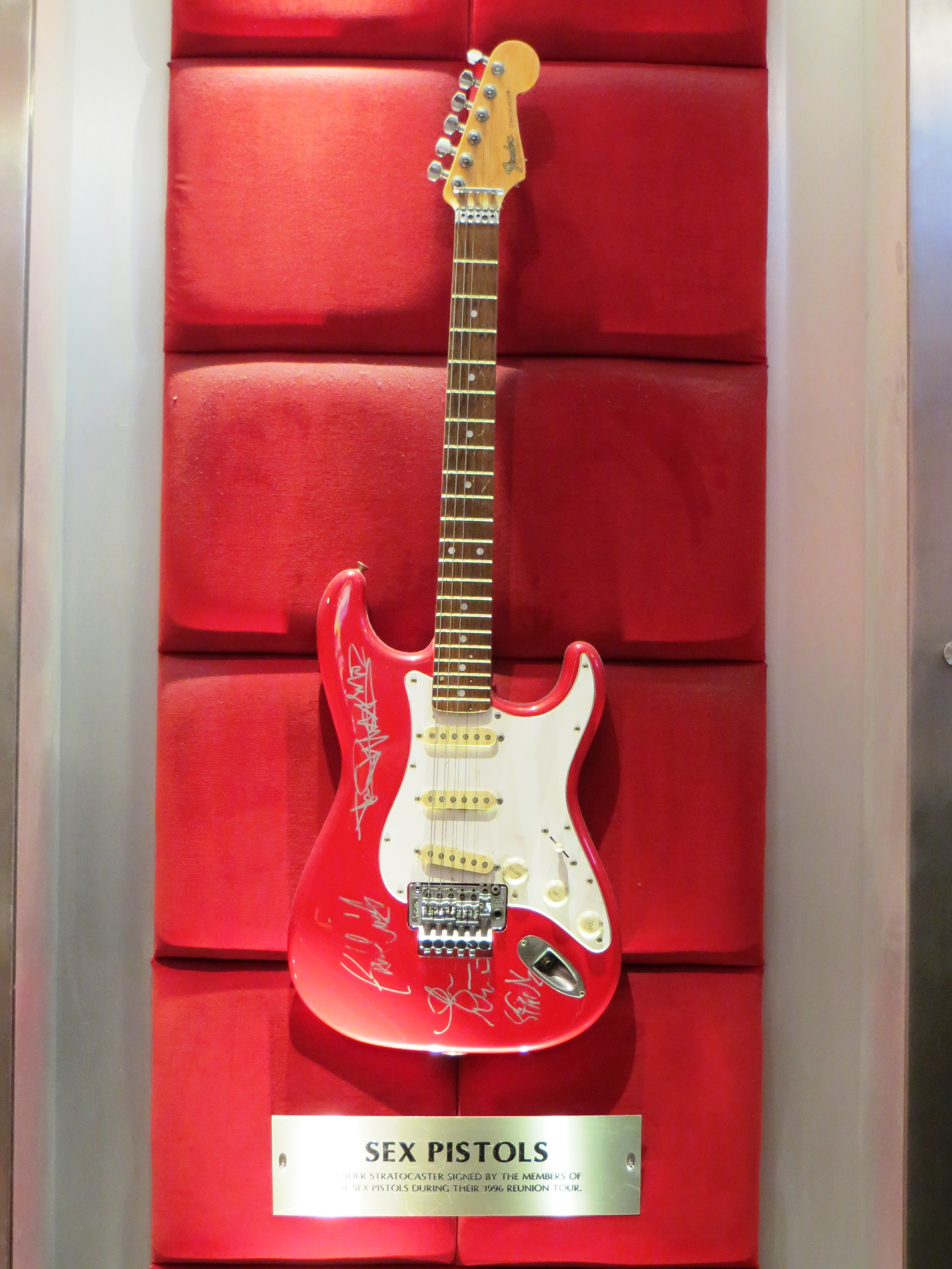 Hard Rock Café Londen